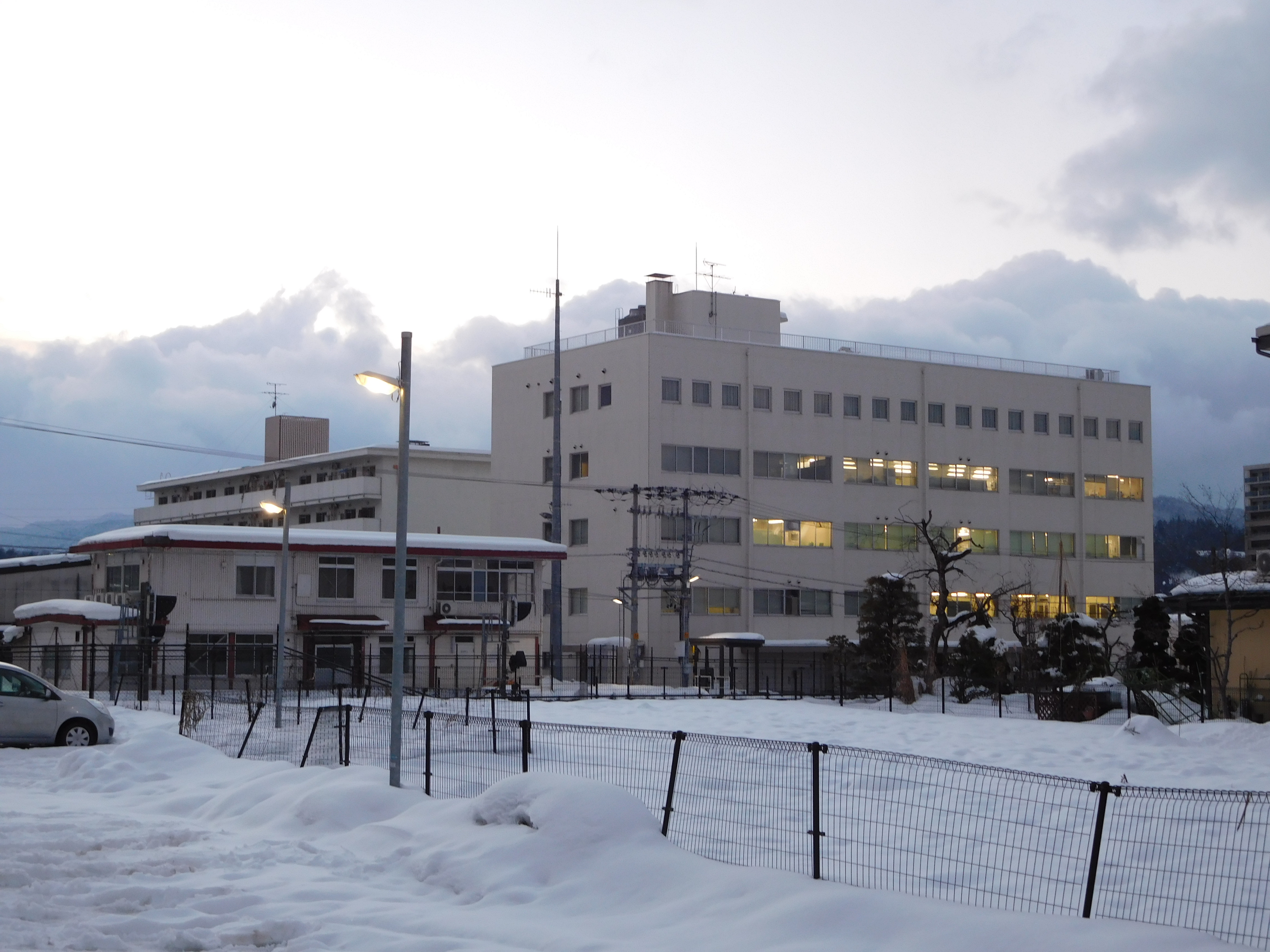 岐阜県高山市昭和町一丁目にある、JR東海高山運輸区。